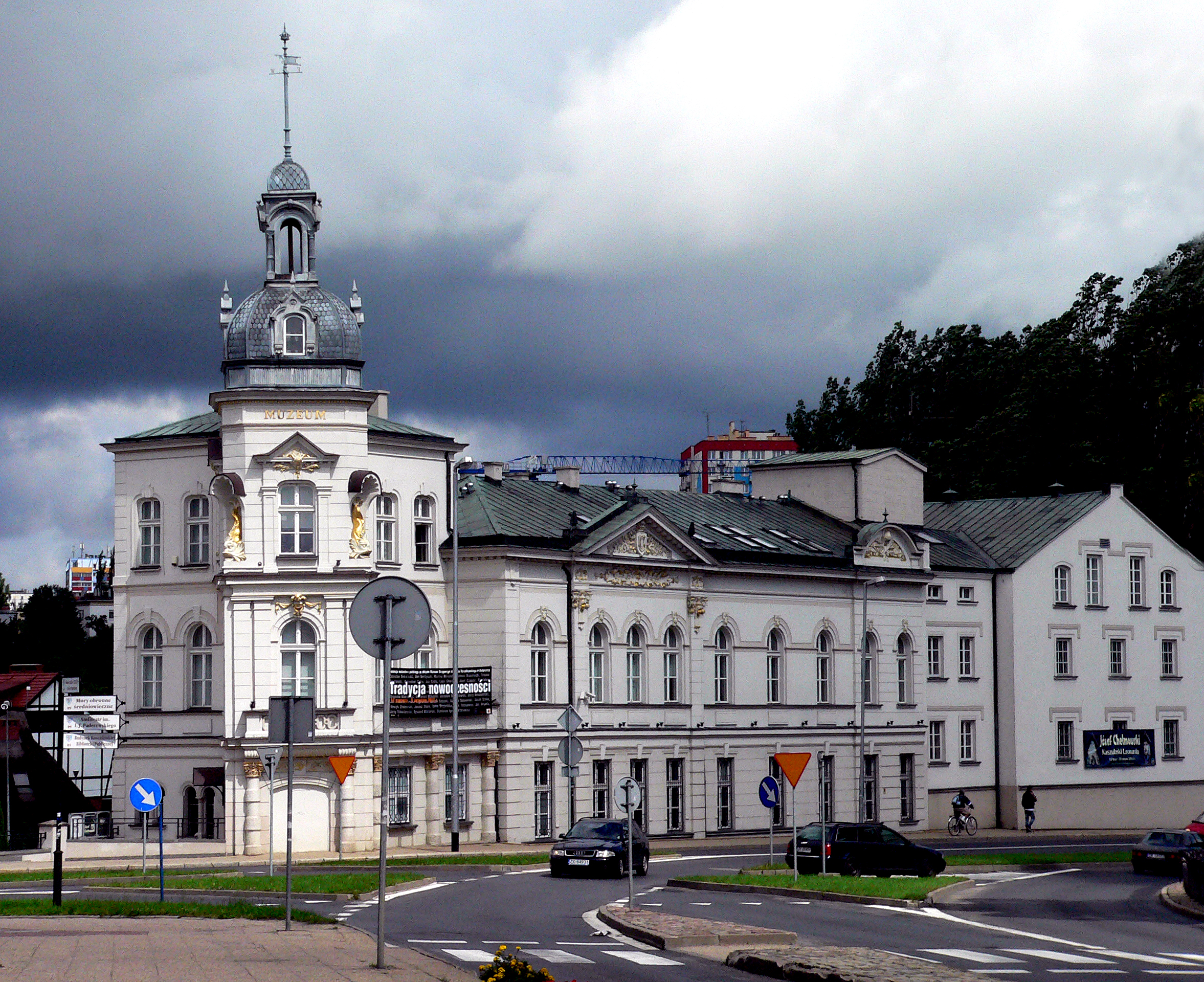 Koszalin, ul. Młyńska 37/39 - zespół młyna miejskiego: młyn, kamienica (obecnie Muzeum w Koszalinie)